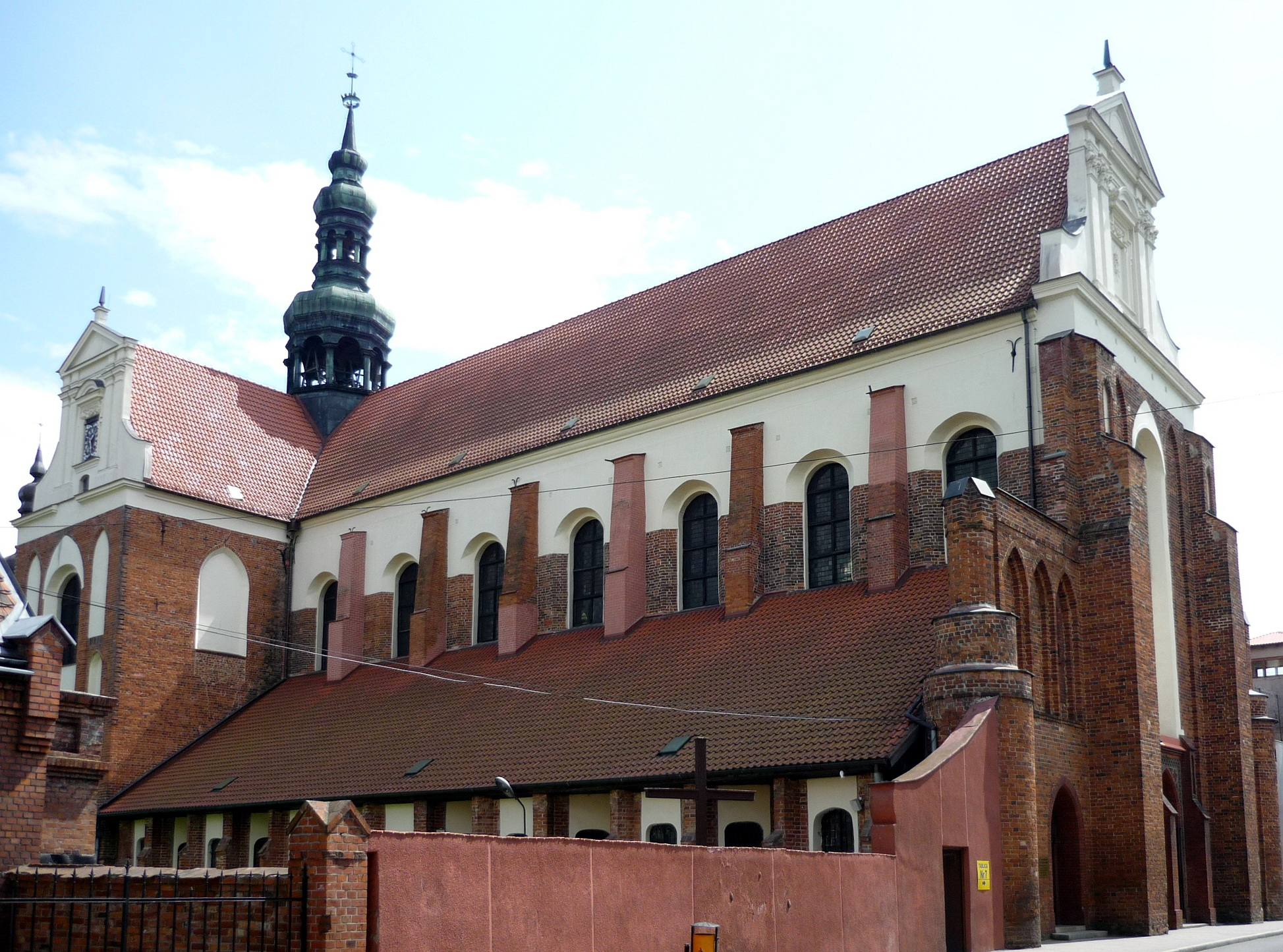 Kościół parafialny pw. Wniebowzięcia Najświętszej Marii Panny w Koronowie.